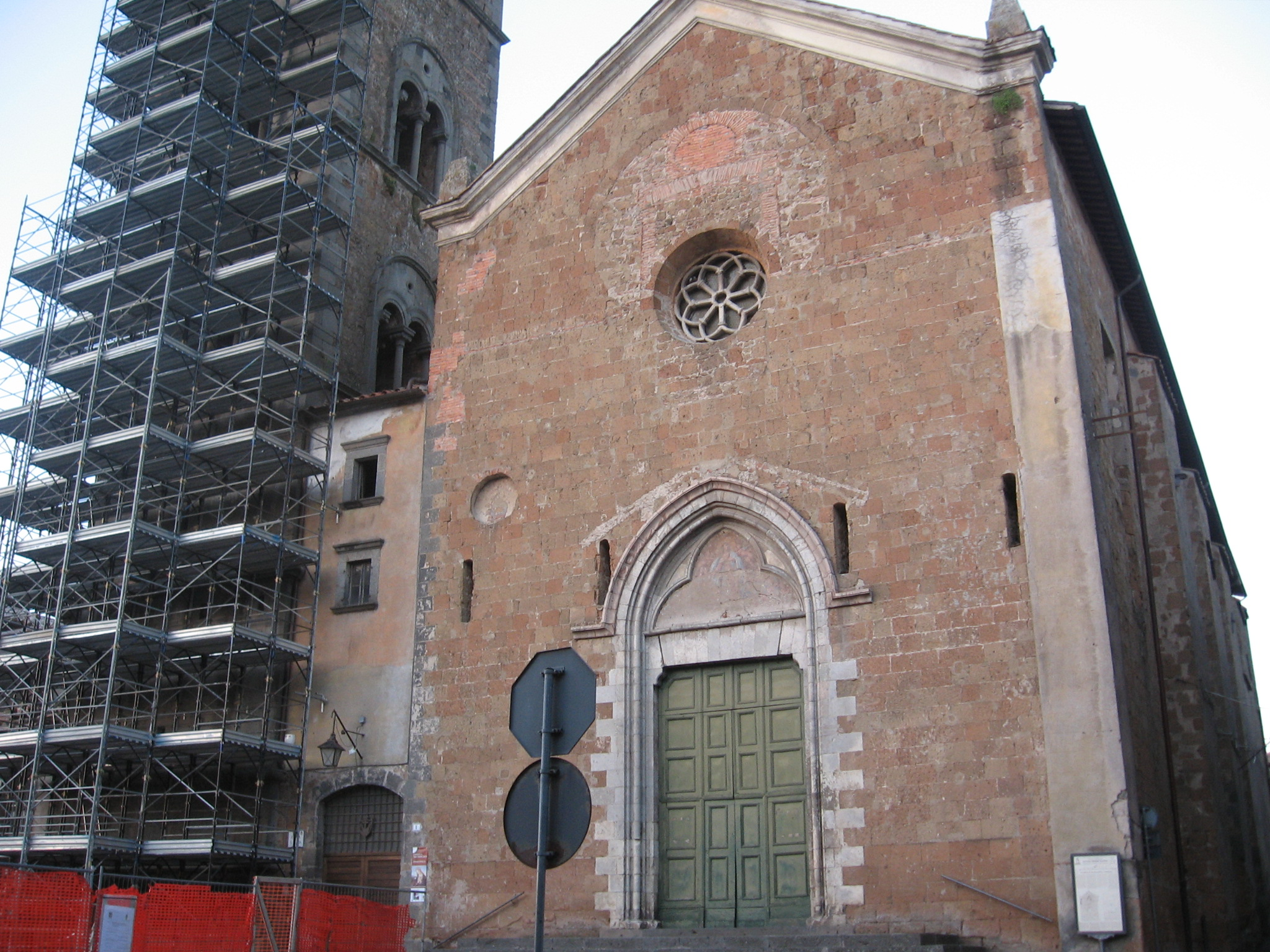 Chiesa di San Francesco (ex Santa Maria), Acquapendente.